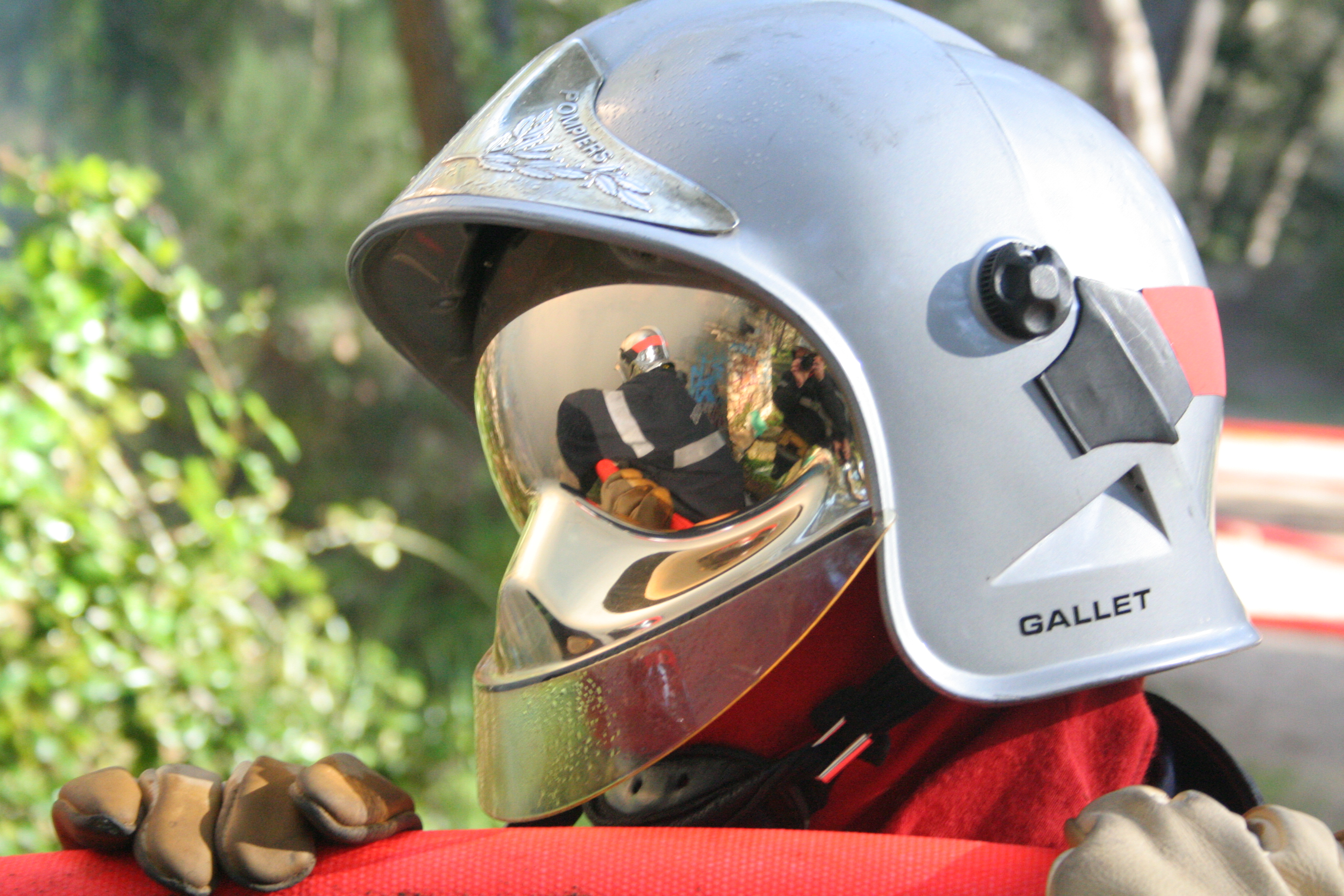 sapeur-pompiers français (SDIS 13) à l'attaque